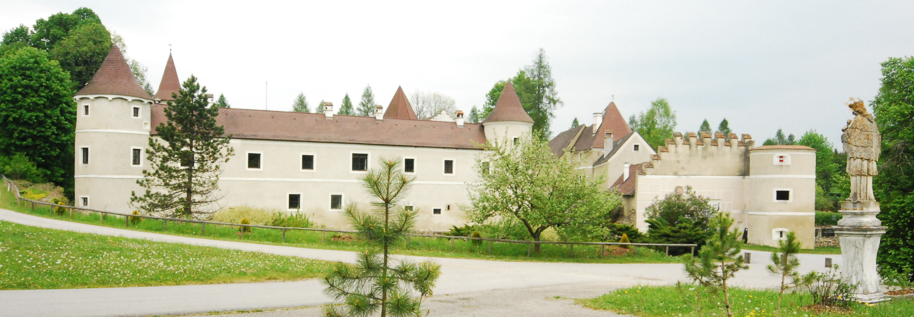 Schloss Waldreichs in Niederösterreich